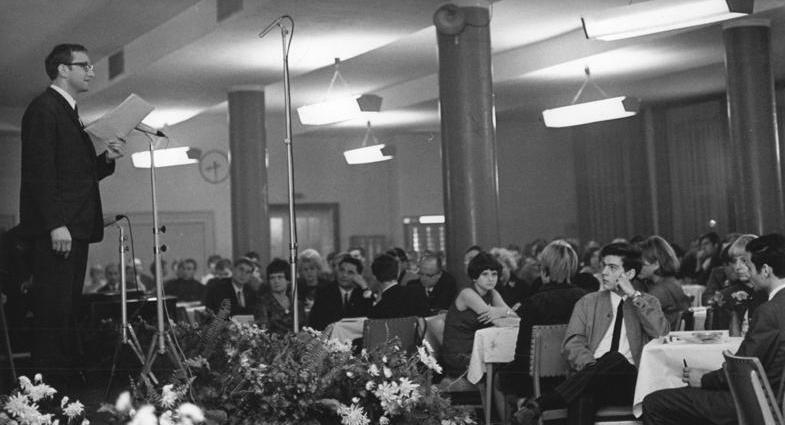 Zentralbild Franke 22.10.1967 Berlin: Eröffnungsveranstaltung zu "Woche des Buches" im Funkwerk Köpenick Aus Anlaß der Woche des Buches las am 22.10.67 auf einer Veranstaltung im Funkwerk Köpenick der Schauspieler Dieter Wien (links) vom Berliner Maxim-Gorki-Theater, Gedichte aus dem zu Ehren des 50. Jahrestag der Großen Sozialistischen Oktoberrevolution im Verlag Neues Leben erschienenen Lyrikband "An Alle".